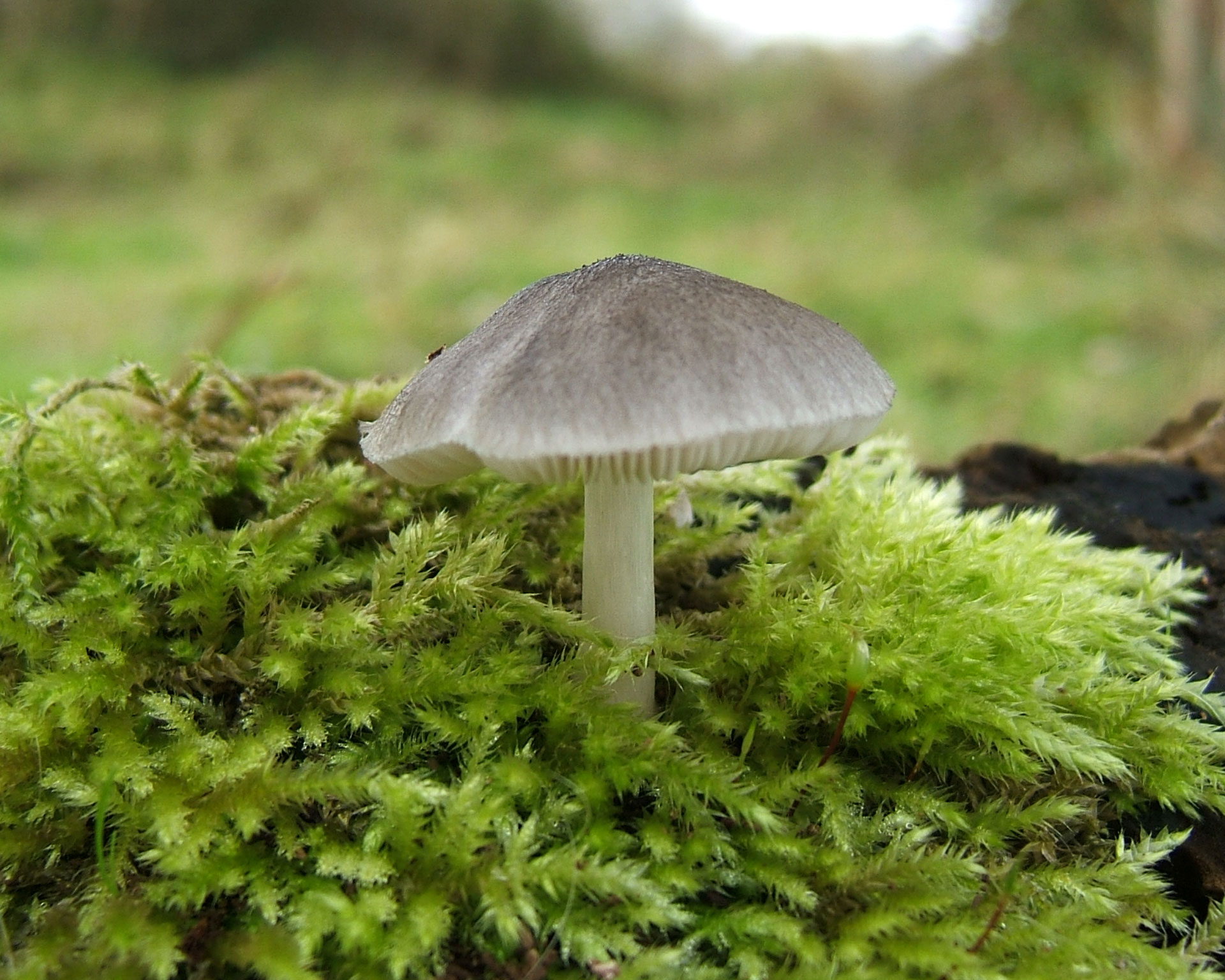 Taken at Framlingham, Suffolk, UK